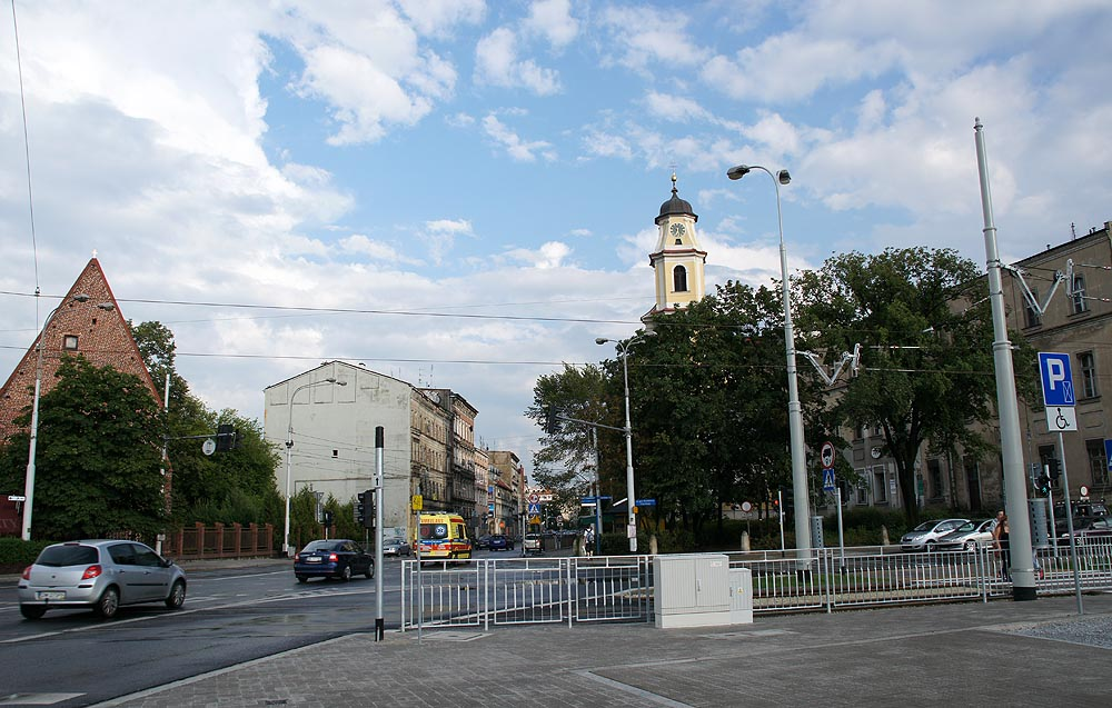 Historyczny układ urbanistyczny Przedmieścia Oławskiego, dzielnicy miasta Wrocław, wraz z archeologicznymi nawarstwieniami kulturowo – osadniczymi w następujących granicach: Od północy: granica przebiega od krawędzi pozostałości fosy miejskiej zwanej „Zatoką Gondol” (dz. nr 9/2), prowadzi południowym nabrzeżem rzeki Odry do ujścia rzeki Oławy. Od wschodu: granica przebiega zach. brzegiem rzeki Oławy do Mostu Rakowieckiego. Od południa: granica biegnie ulicą od wylotu Mostu Rakowieckiego do ulicy Kościuszki, pn. granica działki nr 4/65 ujmując zabudowę w kwartałach wyznaczonych ulicami Chudoby - Więckowskiego - Świstackiego - Prądzyńskiego -Brzeska. Następnie po pn. i wsch. granicy działki 4/14, drogi 4/17, ujmuje zabudowę na dz. 4/65 i 4/54, dochodzi do wiaduktu kolejowego przy ul. Pułaskiego, ujmuje zabudowę po pd. stronie ul. Małachowskiego. Od zachodu: wzdłuż ul. Dworcowej, ul. Podwale do al. Słowackiego, następnie biegnie wschodnią granica zasypanego odcinka fosy miejskiej (na dz. 20/5) do „Zatoki Gondol” (dz. 9/2 i rzeki Odry. Przedmieście Oławskie, Miasto Wrocław - Krzyki